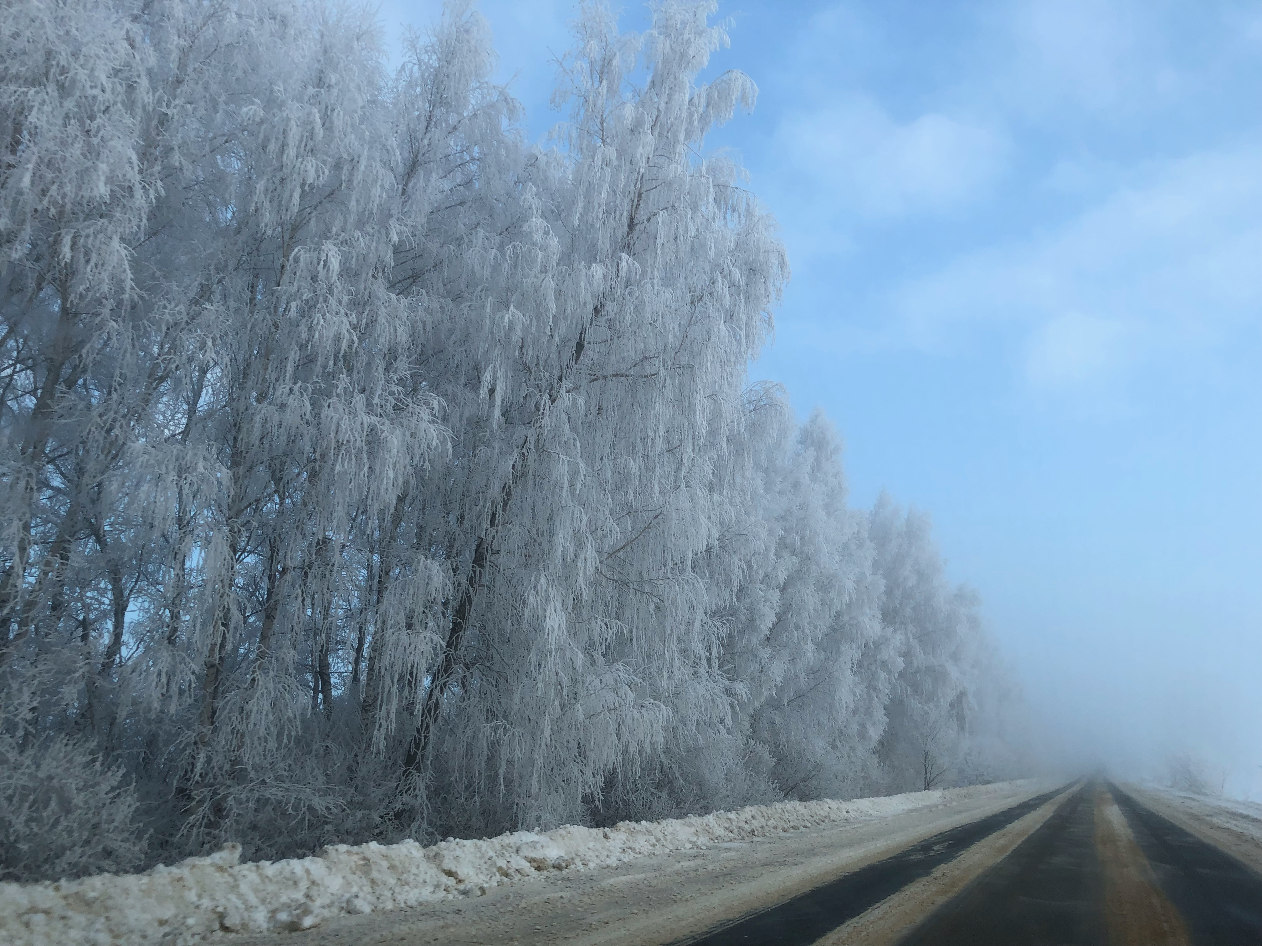 Дорога Венев-Серебряные пруды